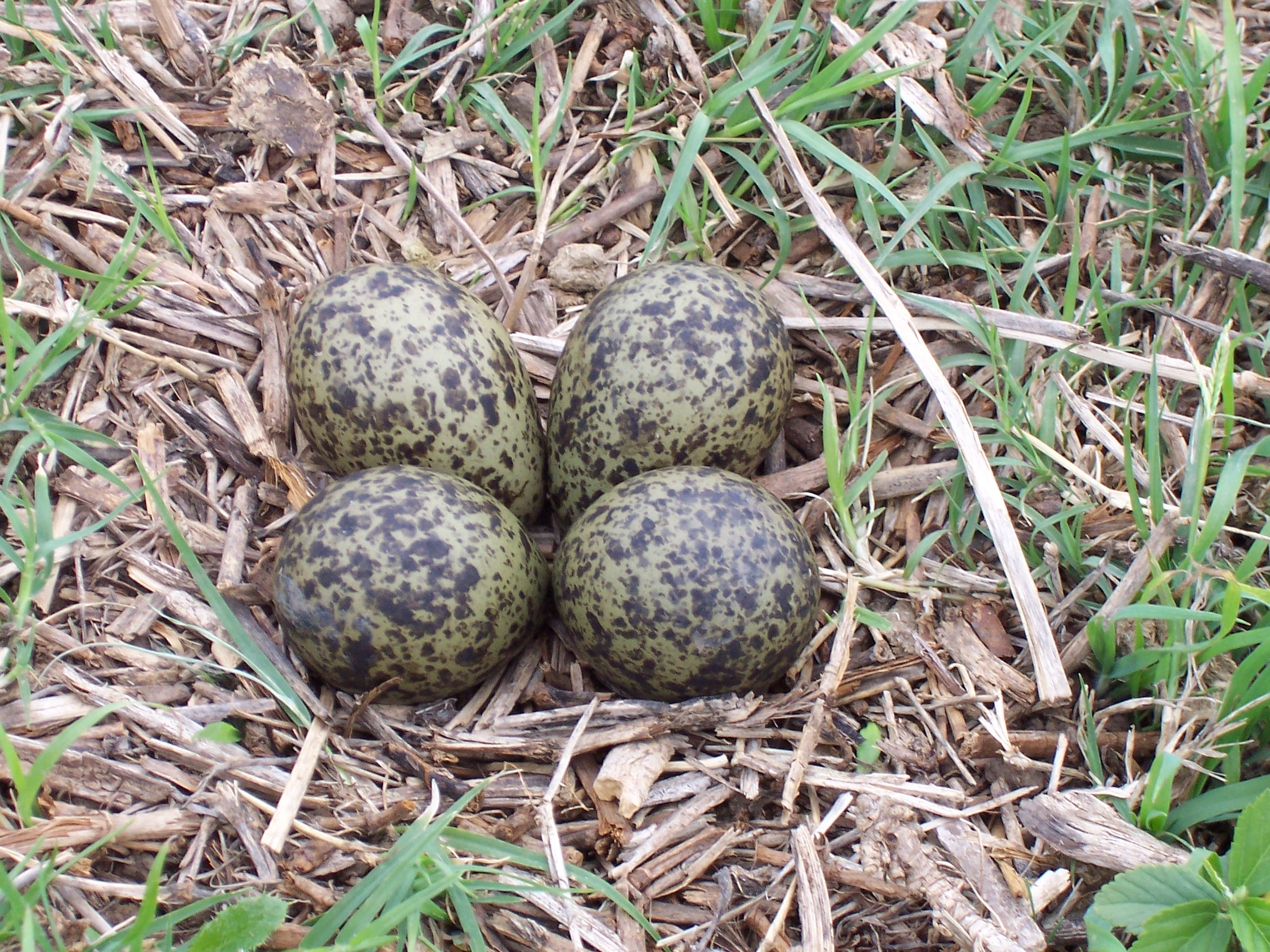 Masked Lapwing Eggs